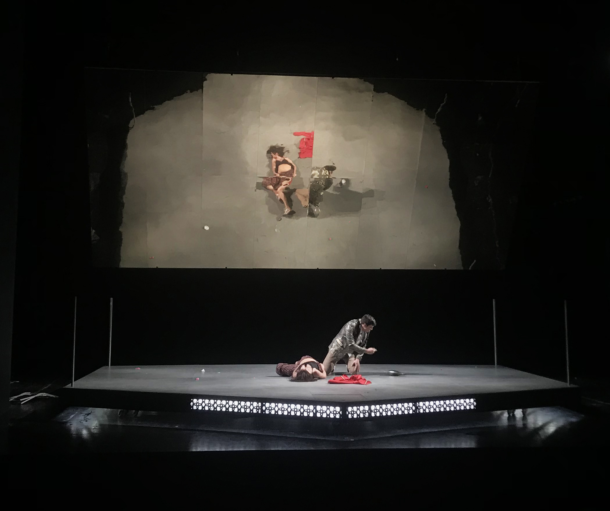 Selestina- JDP, 2019